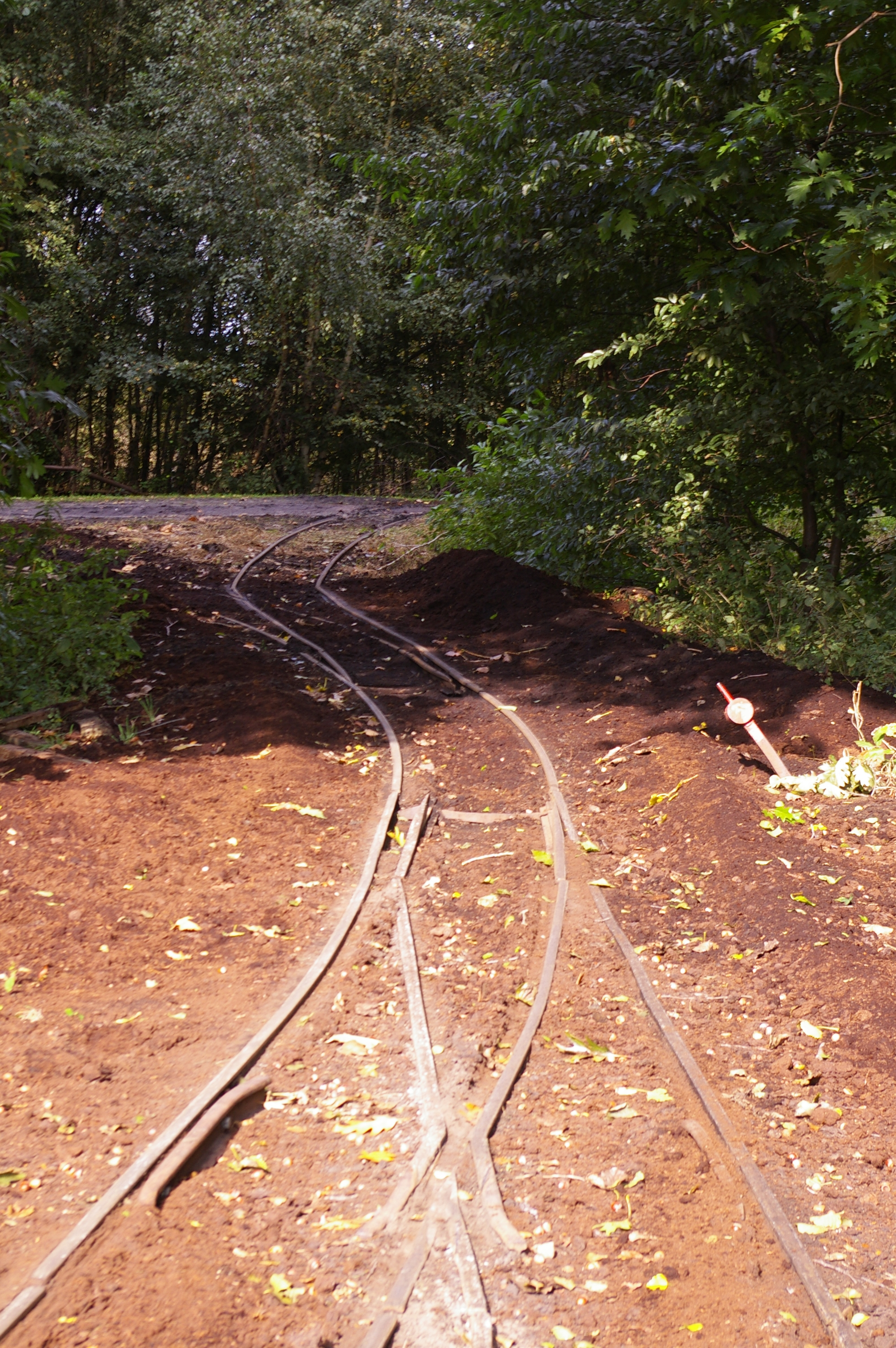 Spoor